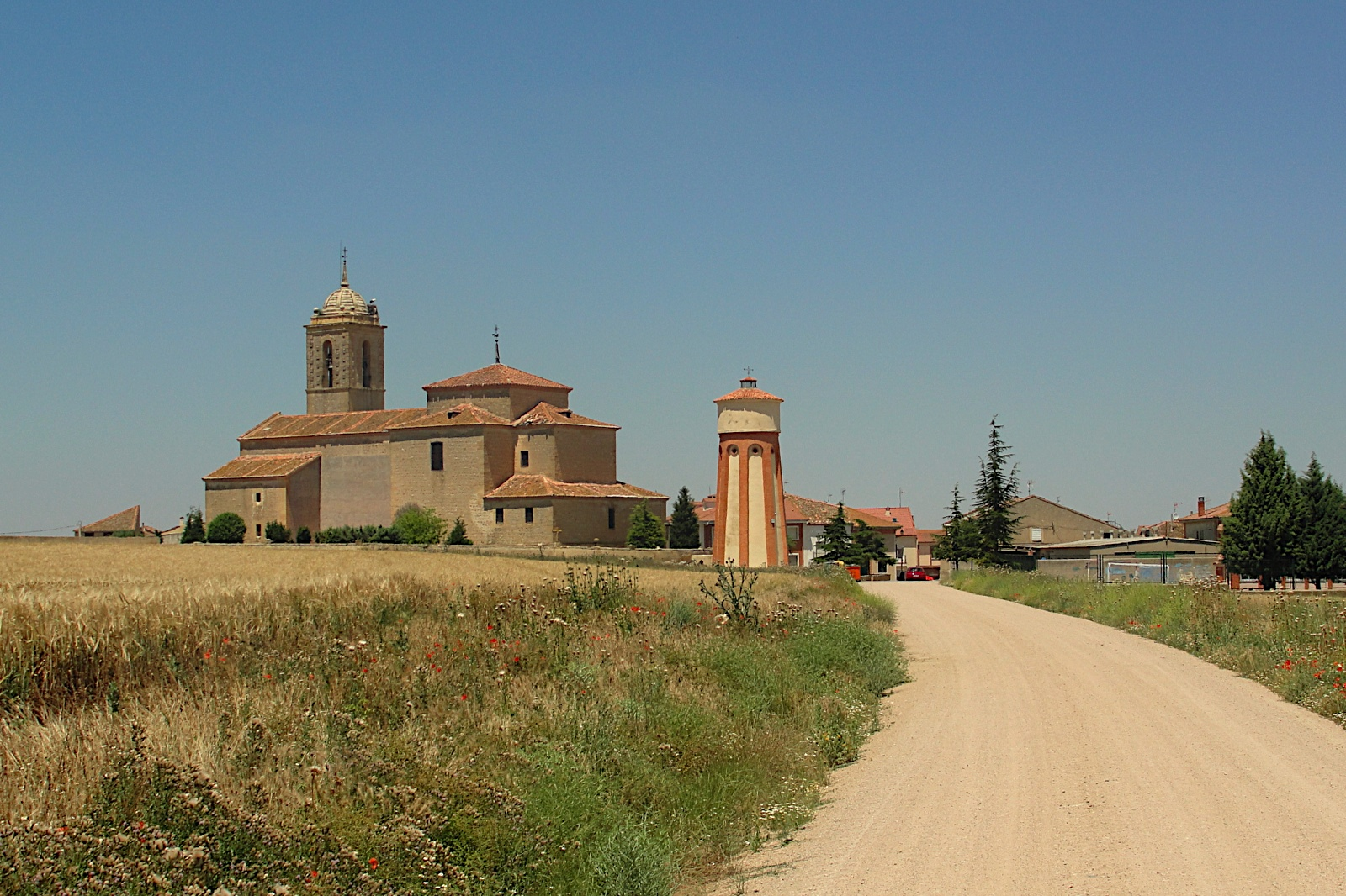 Vista de Valseca